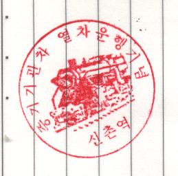 신촌역 증기기관차 운행기념 스탬프